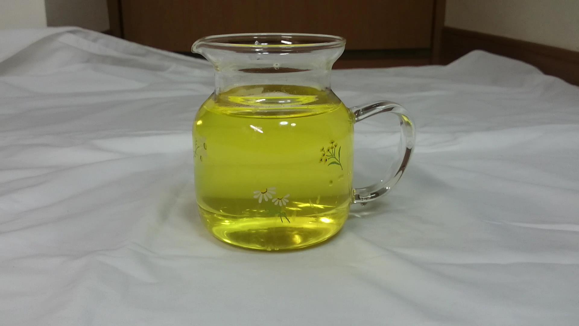 煎じたお茶